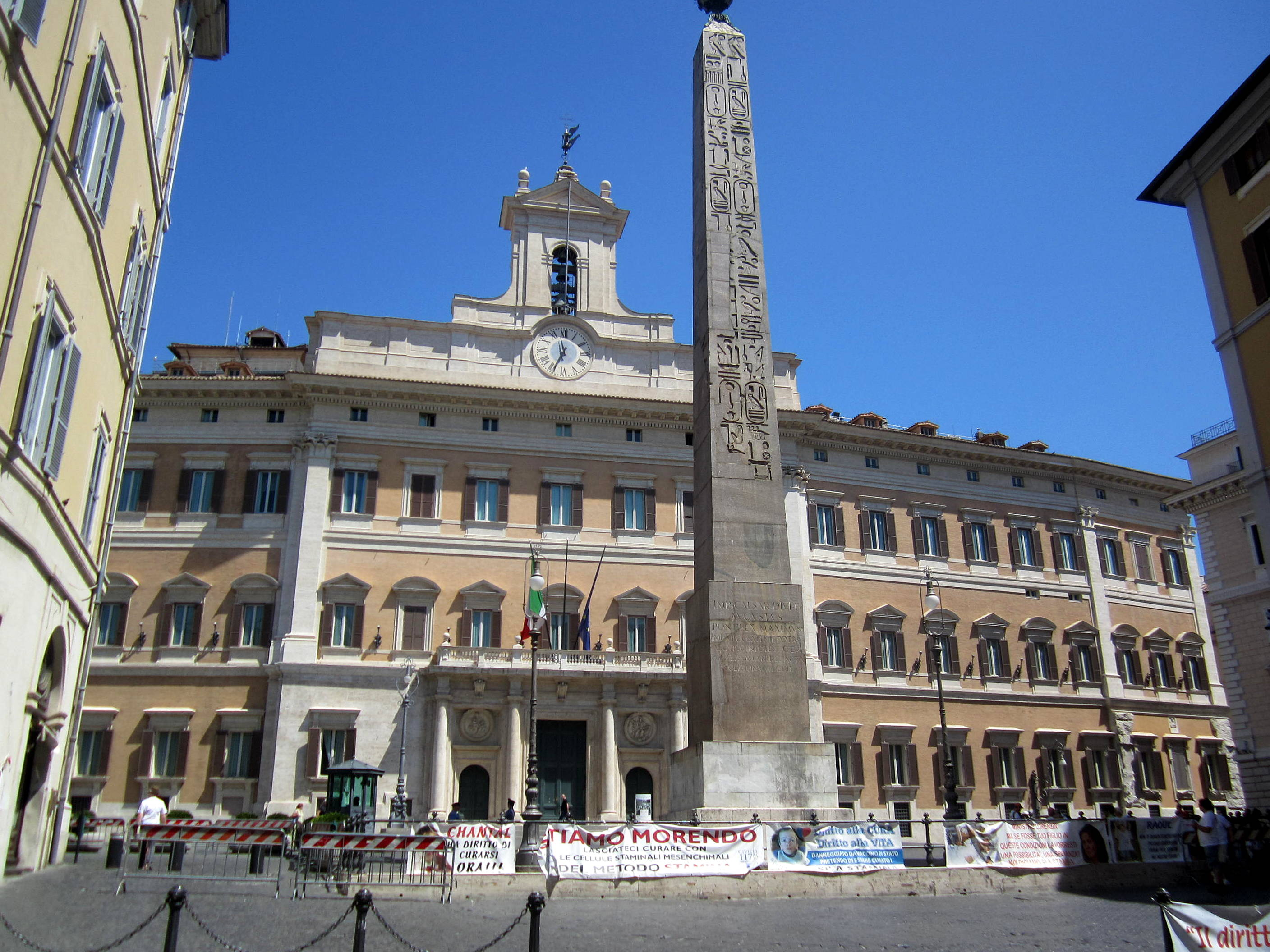 Veduta di Montecitorio, sede della Camera dei Deputati italiani